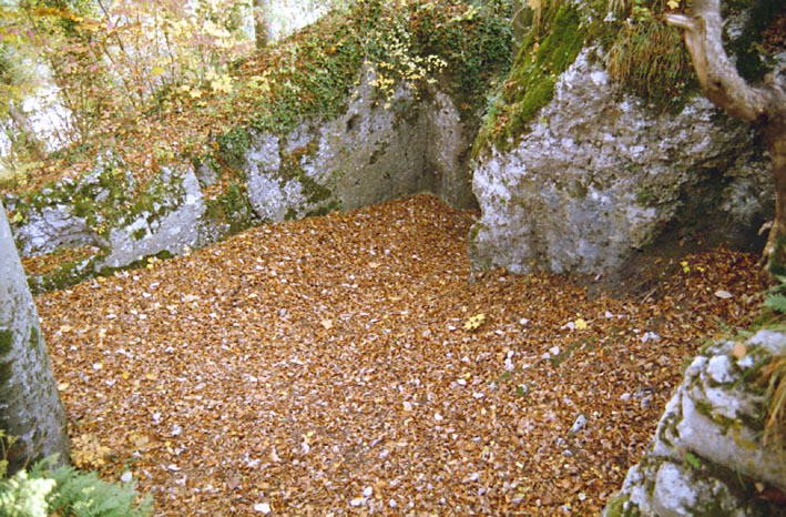 In den Fels geschroteter Raum in der Ruine Bärenfels, Aesch